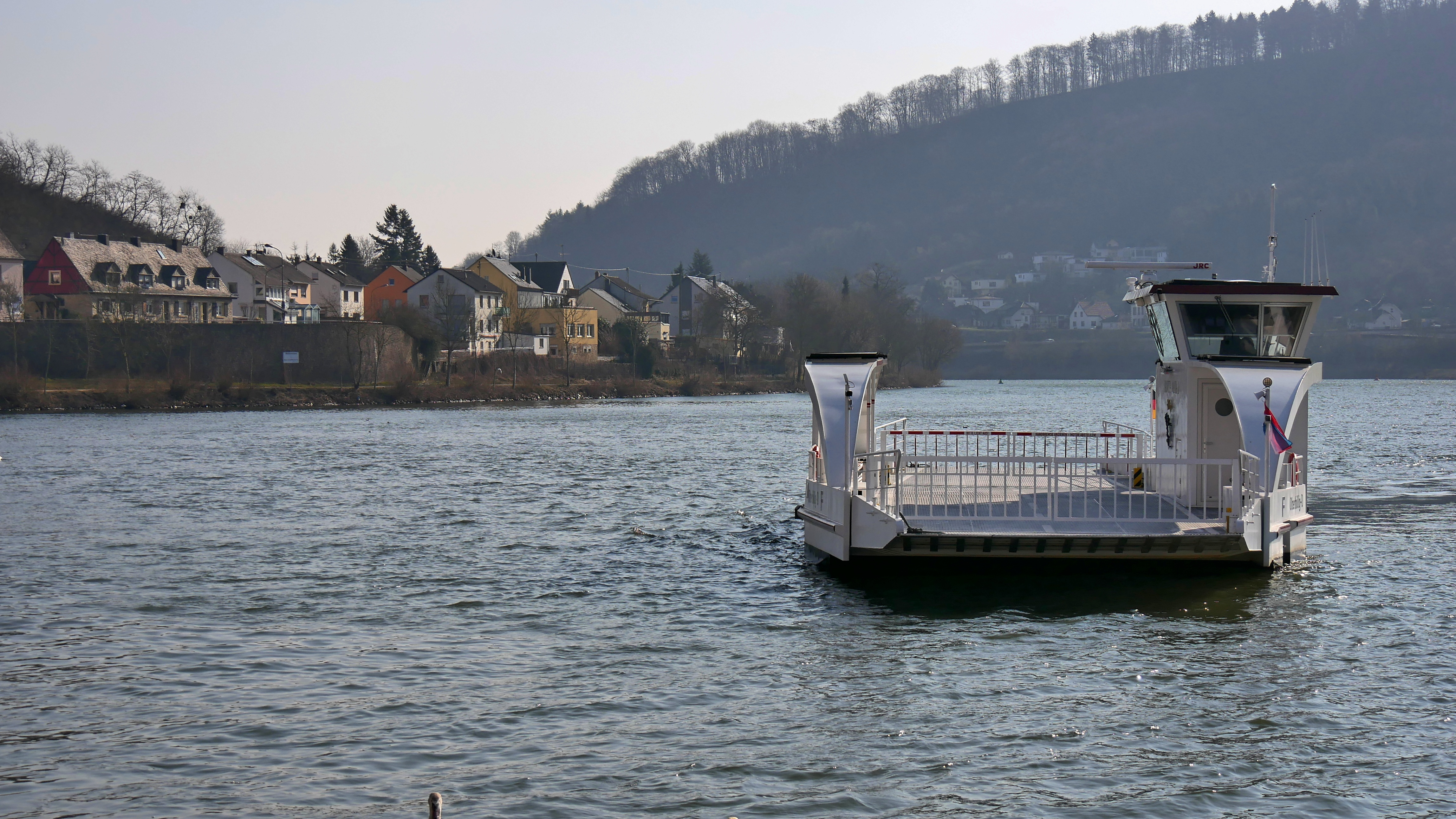 Fähre Santa Maria II zwischen Wasserbillig und Oberbillig. Im Hintergrund links die Häuser von Wasserbilligerbrück